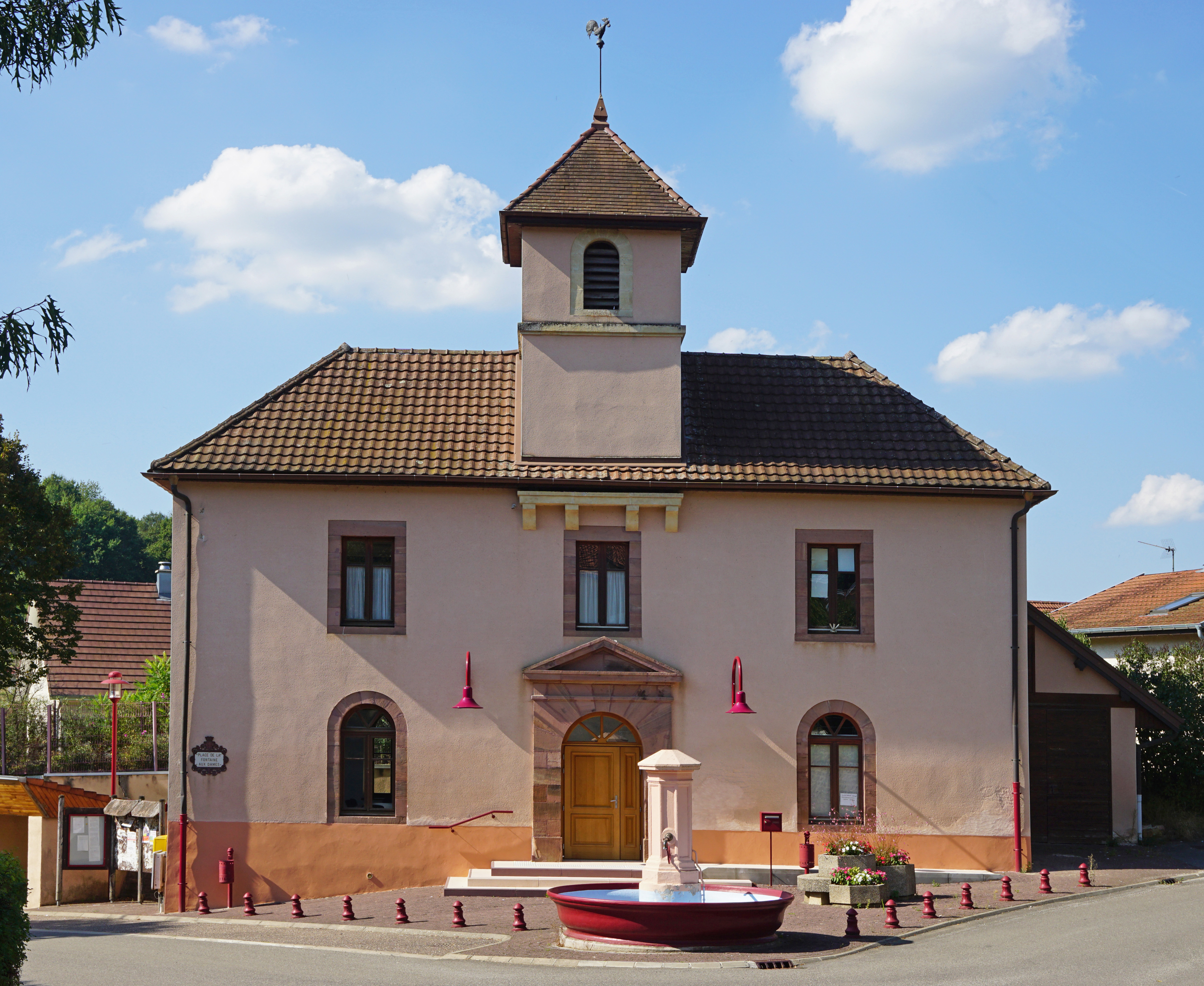 Mairie de Coisevaux.